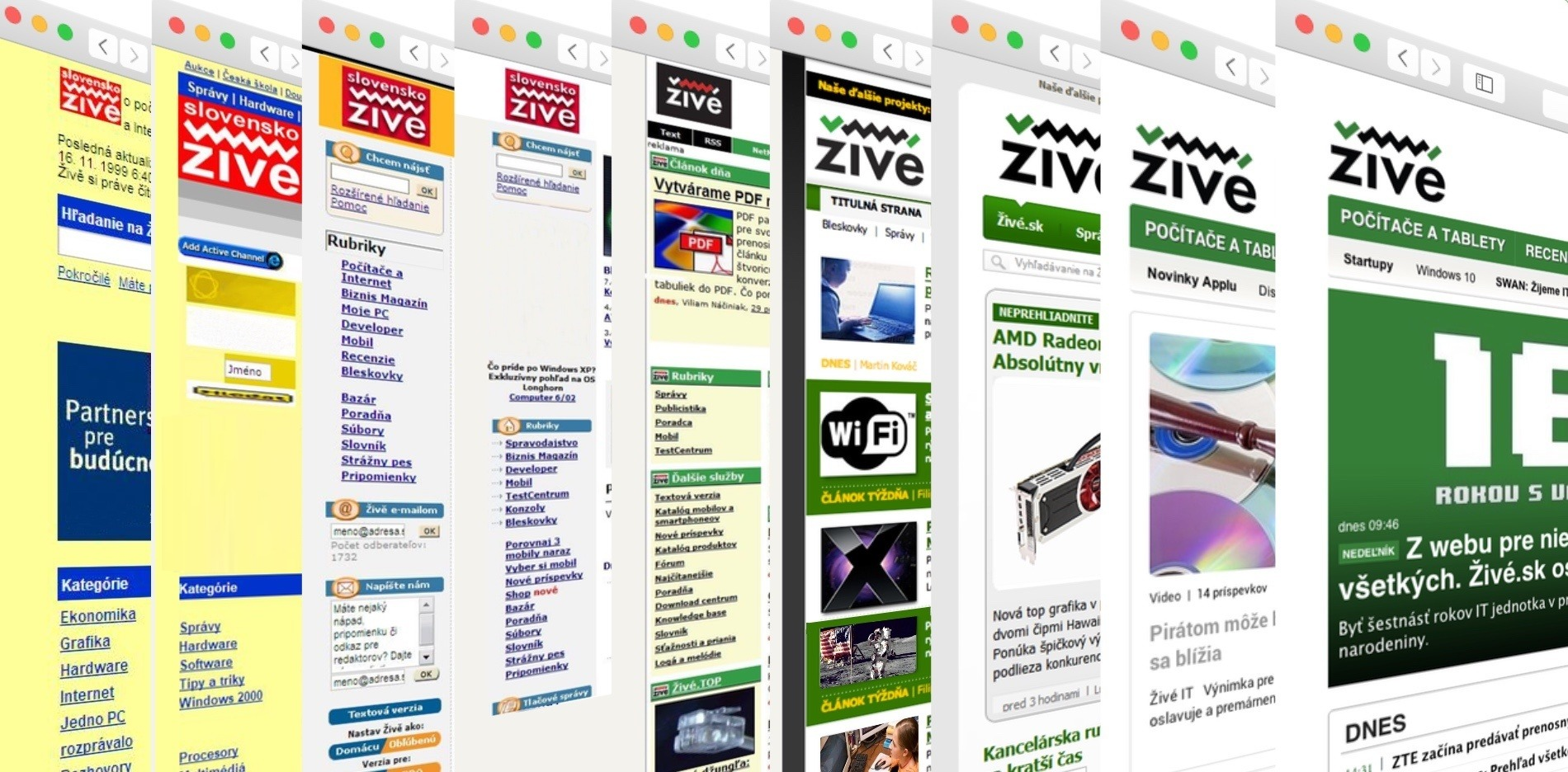 Grafická podoba webu Živé.sk medzi rokmi 1999 až 2015.